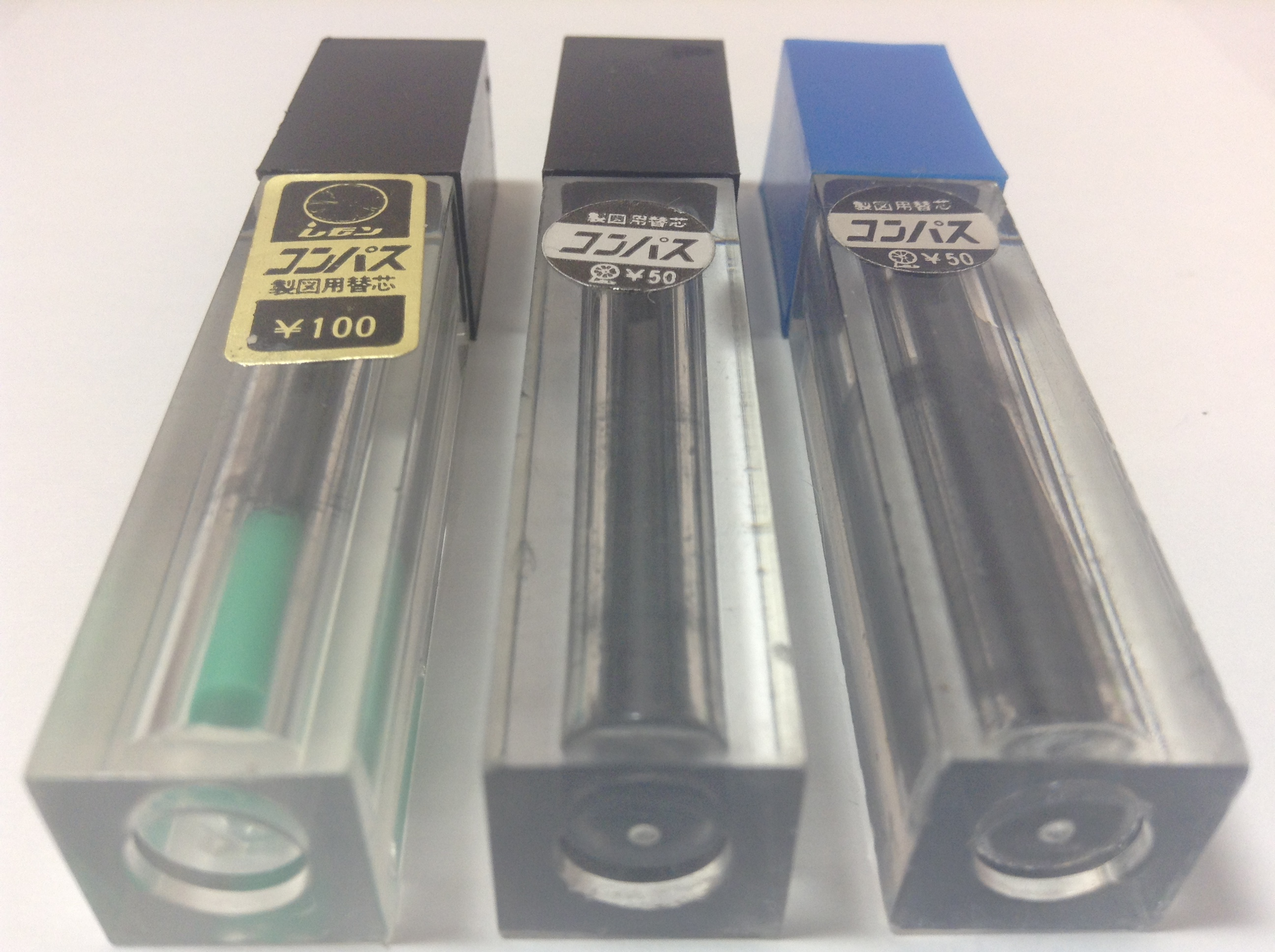 レモンのコンパス芯